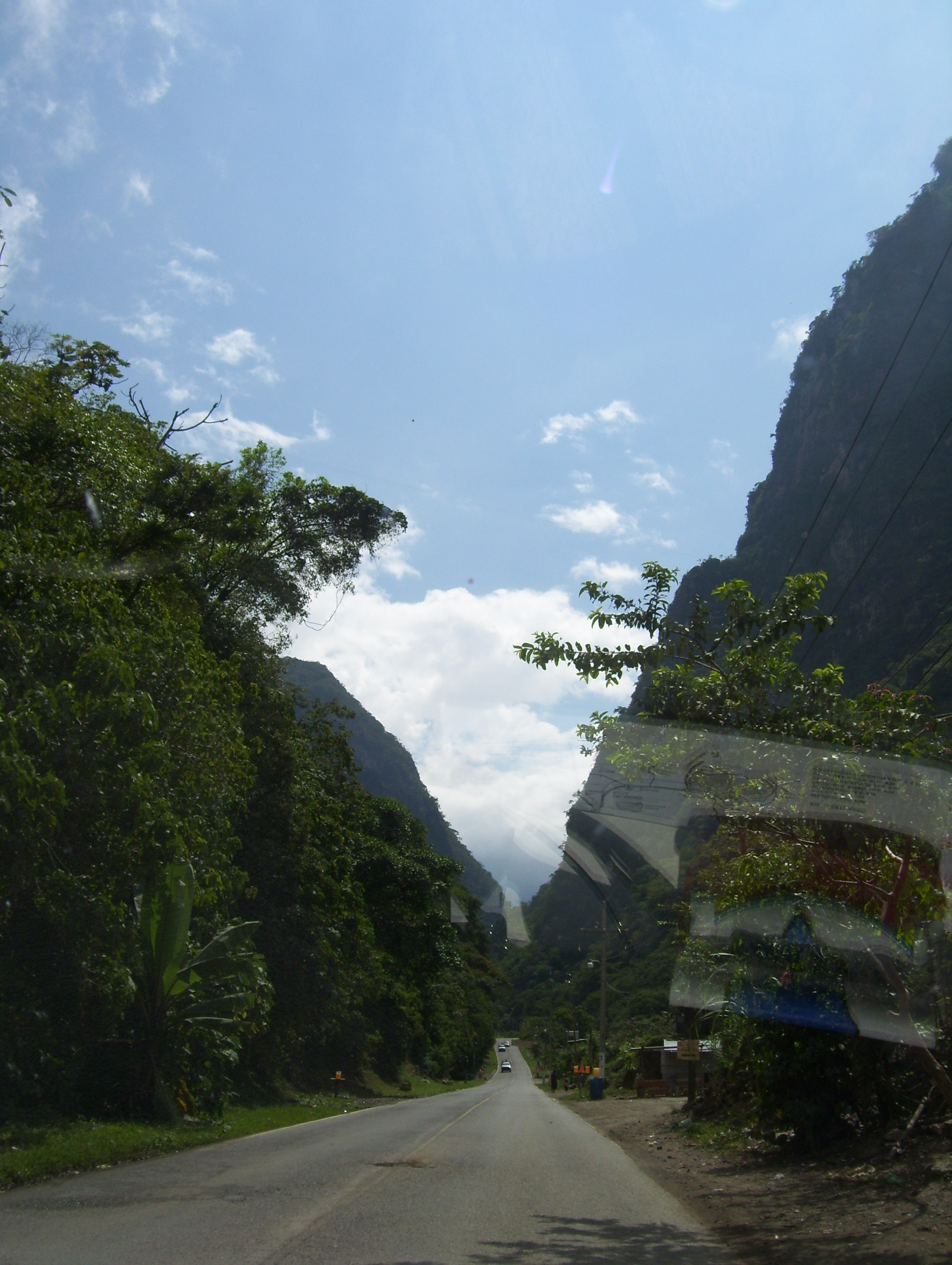 Fotografía tomada sobre la carretera panamericana (CA-1), departamento de Huehuetenango. Este relieve es típico del departamento de Huehuetenango.